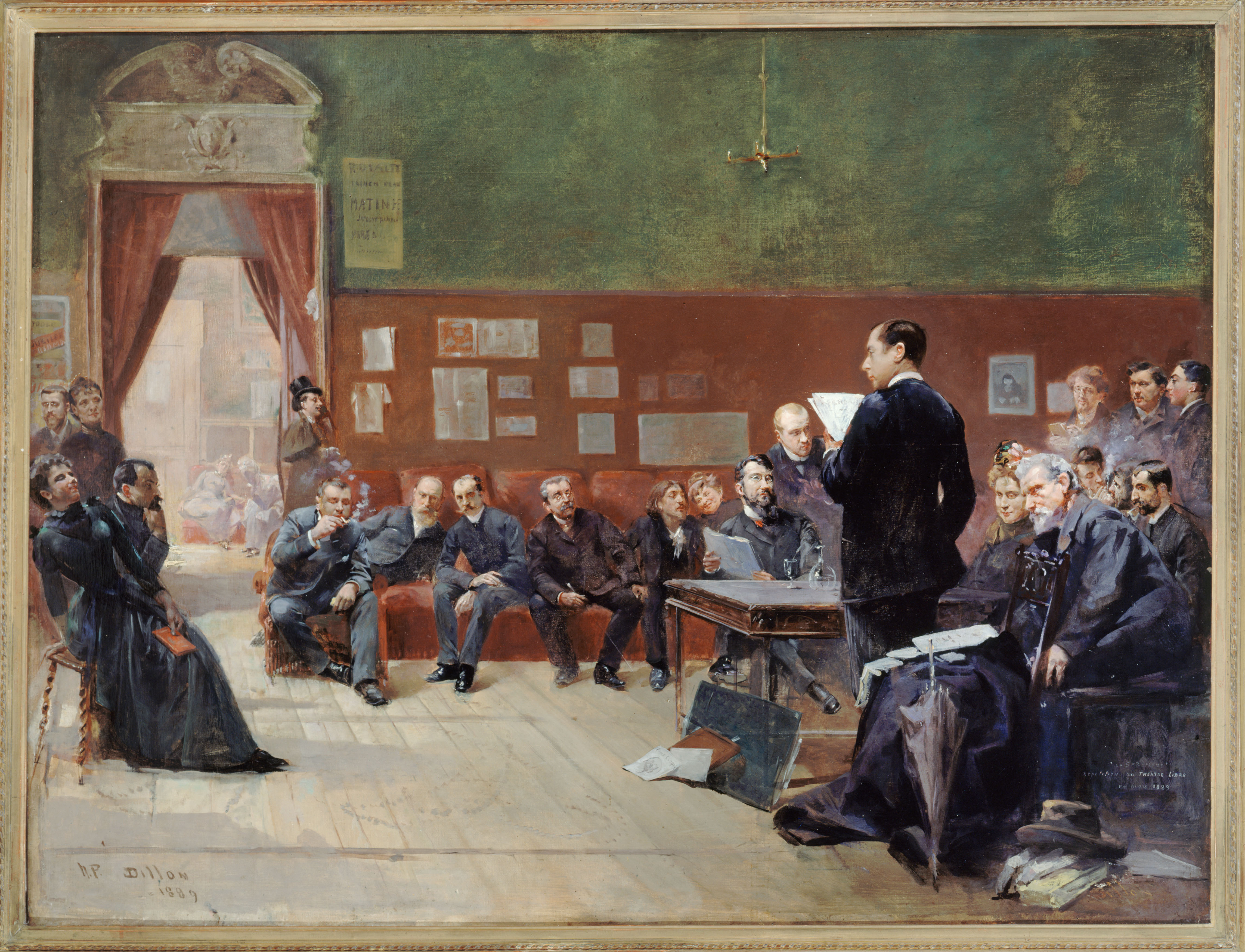 Répétition de la Sérénade de Jean Jullien, au Théâtre-Libre, 97cm × 136 cm, signé et daté en bas à gauche: H.P Dillon / 1889, inscription à droite: LA SERENADE / répétition au THEATRE LIBRE EN MARS 1889, conservé au Musée Carnavalet, Paris.Lieu représenté: Théâtre-Libre (Salle des Menus-Plaisirs, 14 boulevard de Strasbourg, Paris) qui prit en 1897 le nom de Théâtre Antoine [1].Sont représentés : Paul Vidal, Mme Bamy, Chastanet, Georges Ancey, Mme France, Jean Jullien, André Antoine, Mme Dorcy, Guiraud et Salandry.